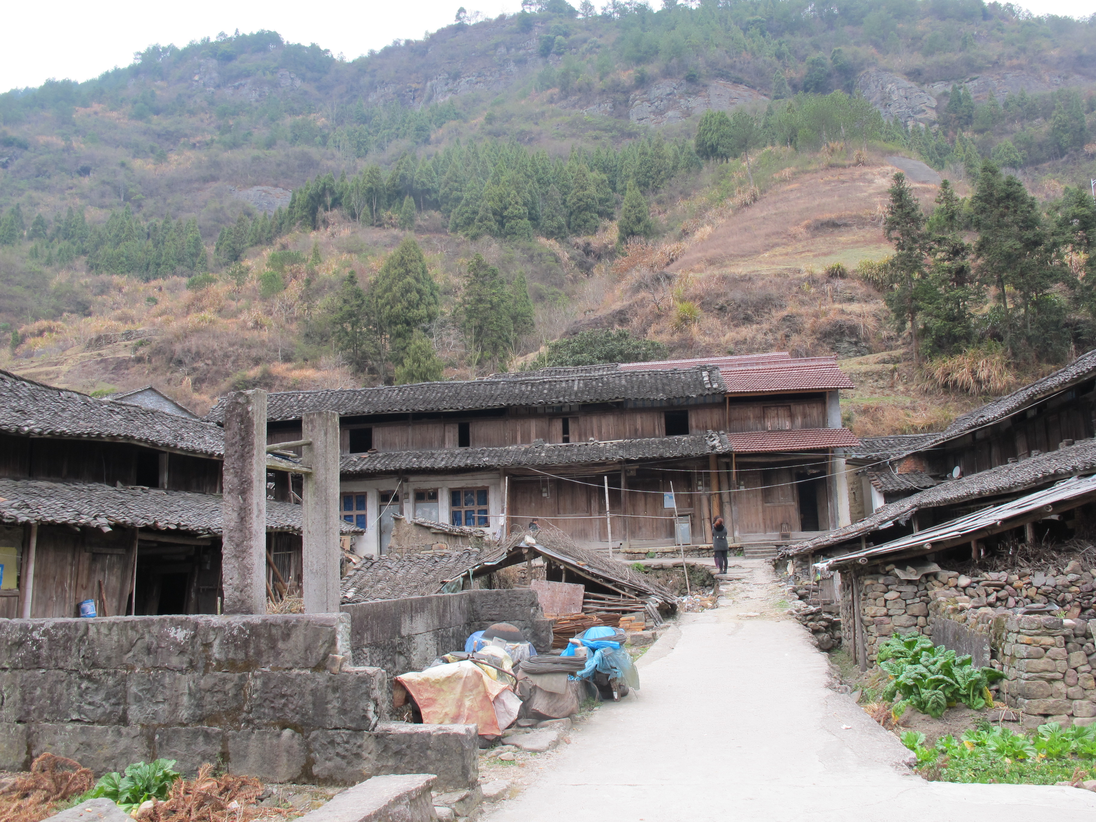 田市镇前坑村的老屋